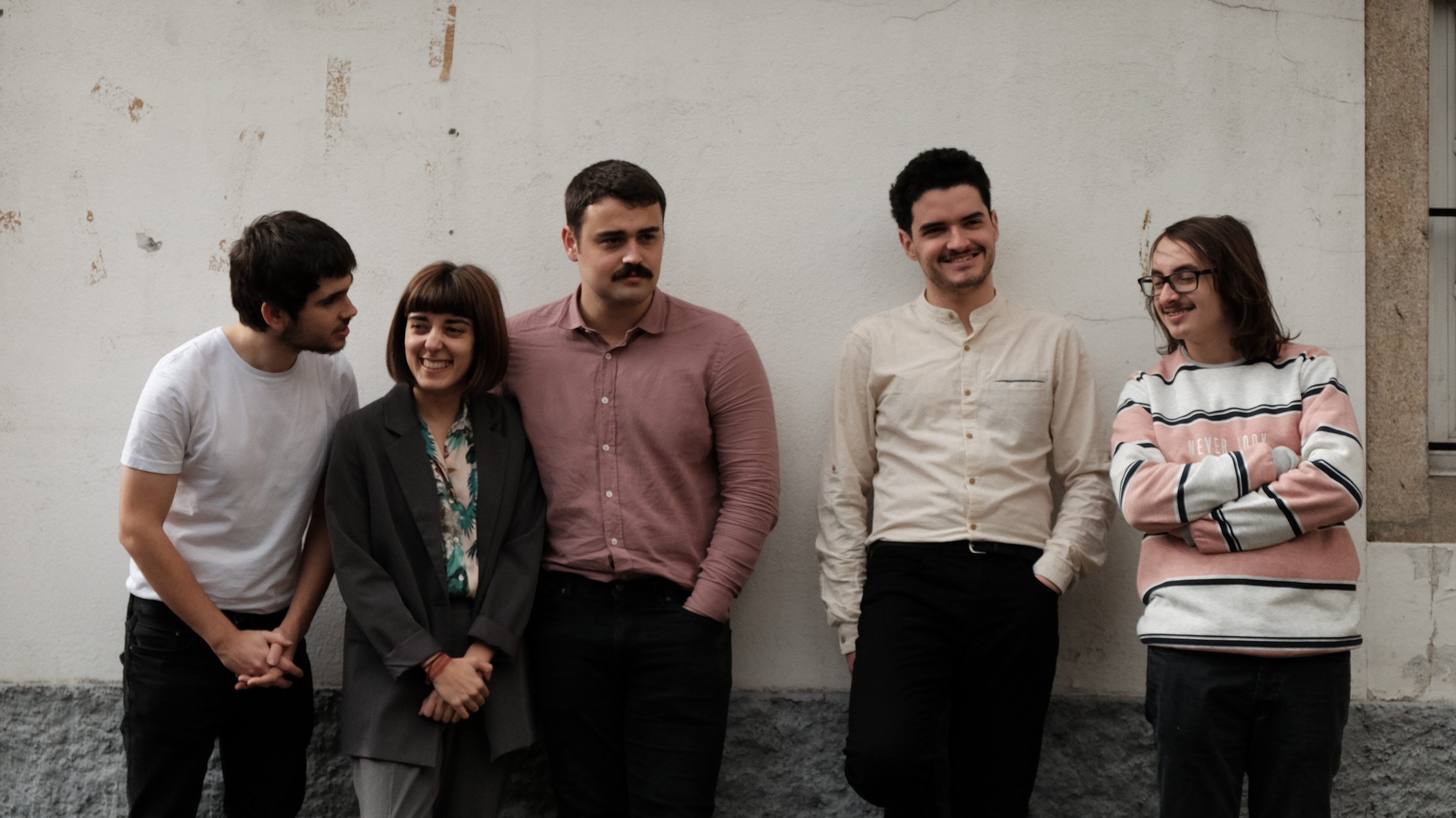 Oh! Ayatollah por Christofer Fernández